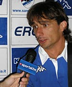 capitano